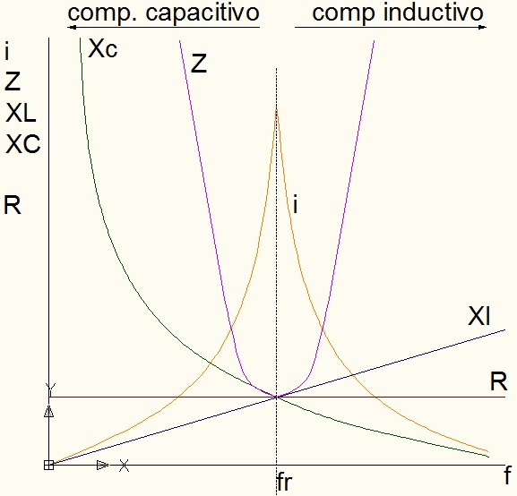 Ejes cartesianos determinando la frecuencia de resonancia en un circuito según sus componentes capacitivos, inductivos y resistivos